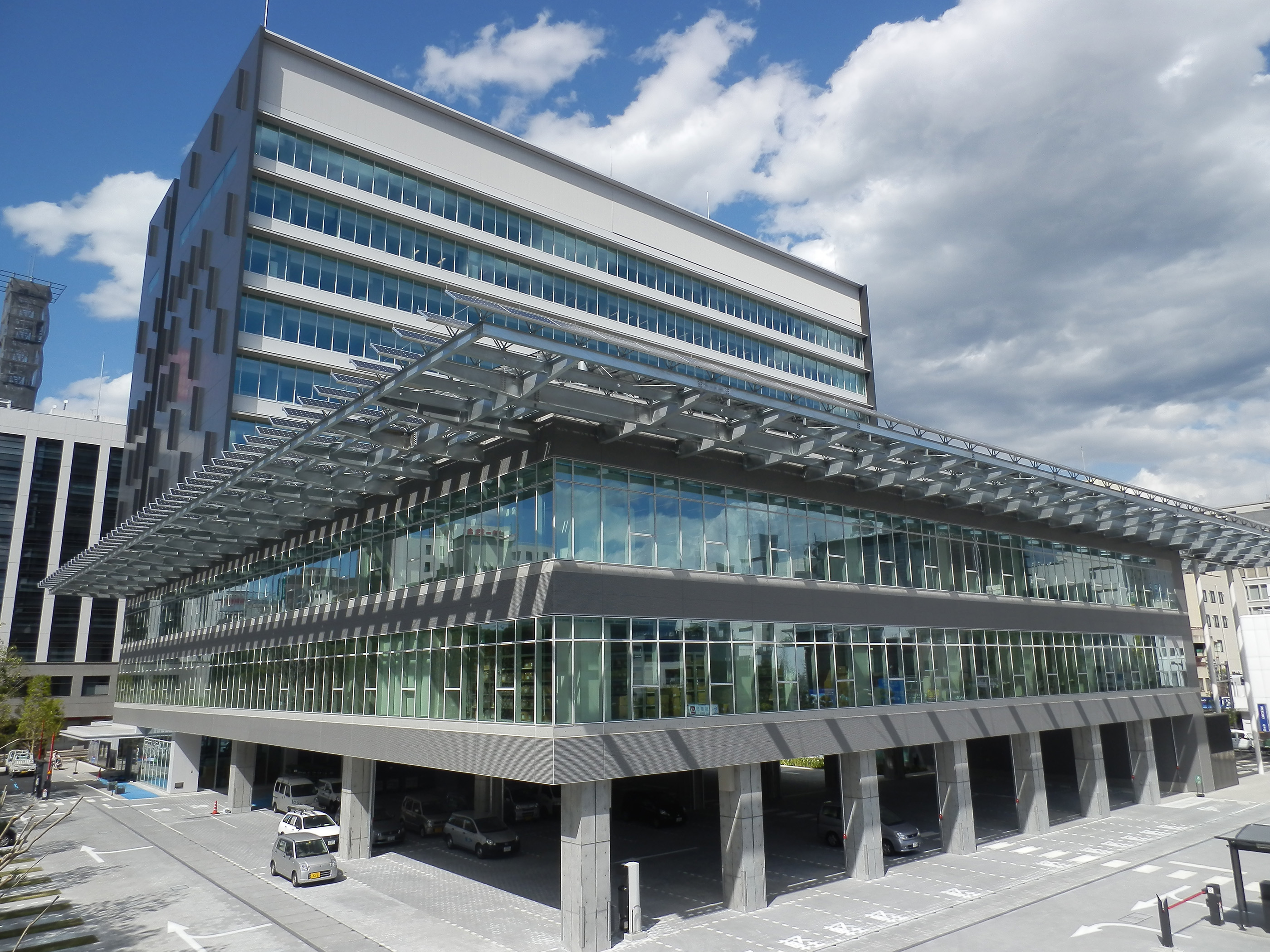 甲府市役所（2013年5月2日撮影）